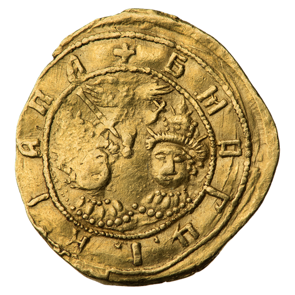 Пол-угорского. Софья Алексеевна (1682—1689) (аверс). ГМ 12.I.12 (редкая); Биткин II 94.3 (R3). Погрудное изображение юных царей Иоанна и Петра в царских венцах и облачении. Наверху, между головами, двуглавый орёл без корон со скипетром и державой в лапах. Круговая надпись: + Б М В Г Ц I К I А П А (БОЖИЕЙ МИЛОСТИЮ ВЕЛИКИЕ ГОСУДАРИ ЦАРИ И КНЯЗИ ИОАНН АЛЕКСЕЕВИЧ ПЕТР АЛЕКСЕЕВИЧ). Внизу, по сторонам буквы «I» небольшие буквы C-I, которые возможно являются инициалами резчика штемпелей — Семидел Иона.